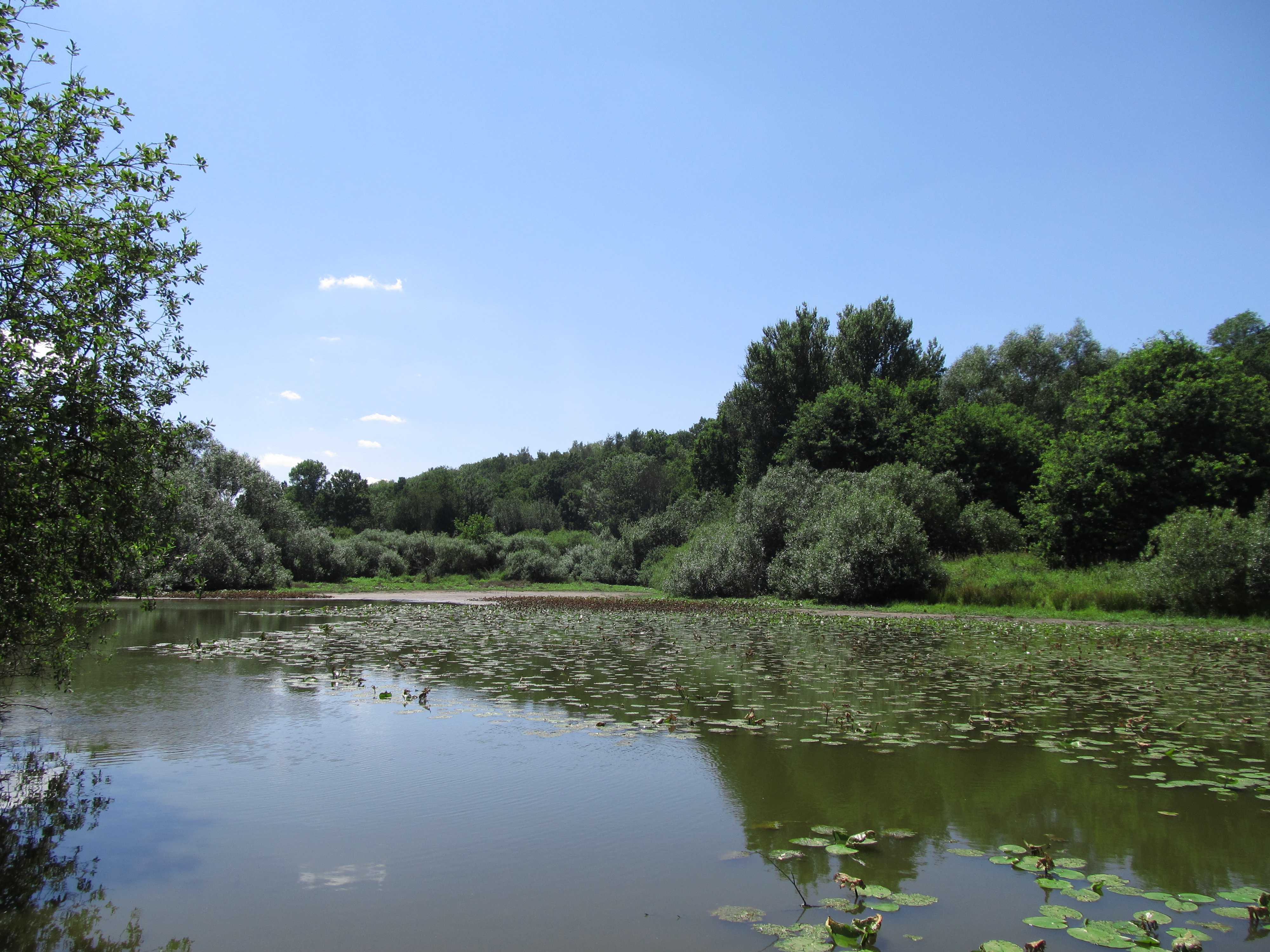 Stará Jizera